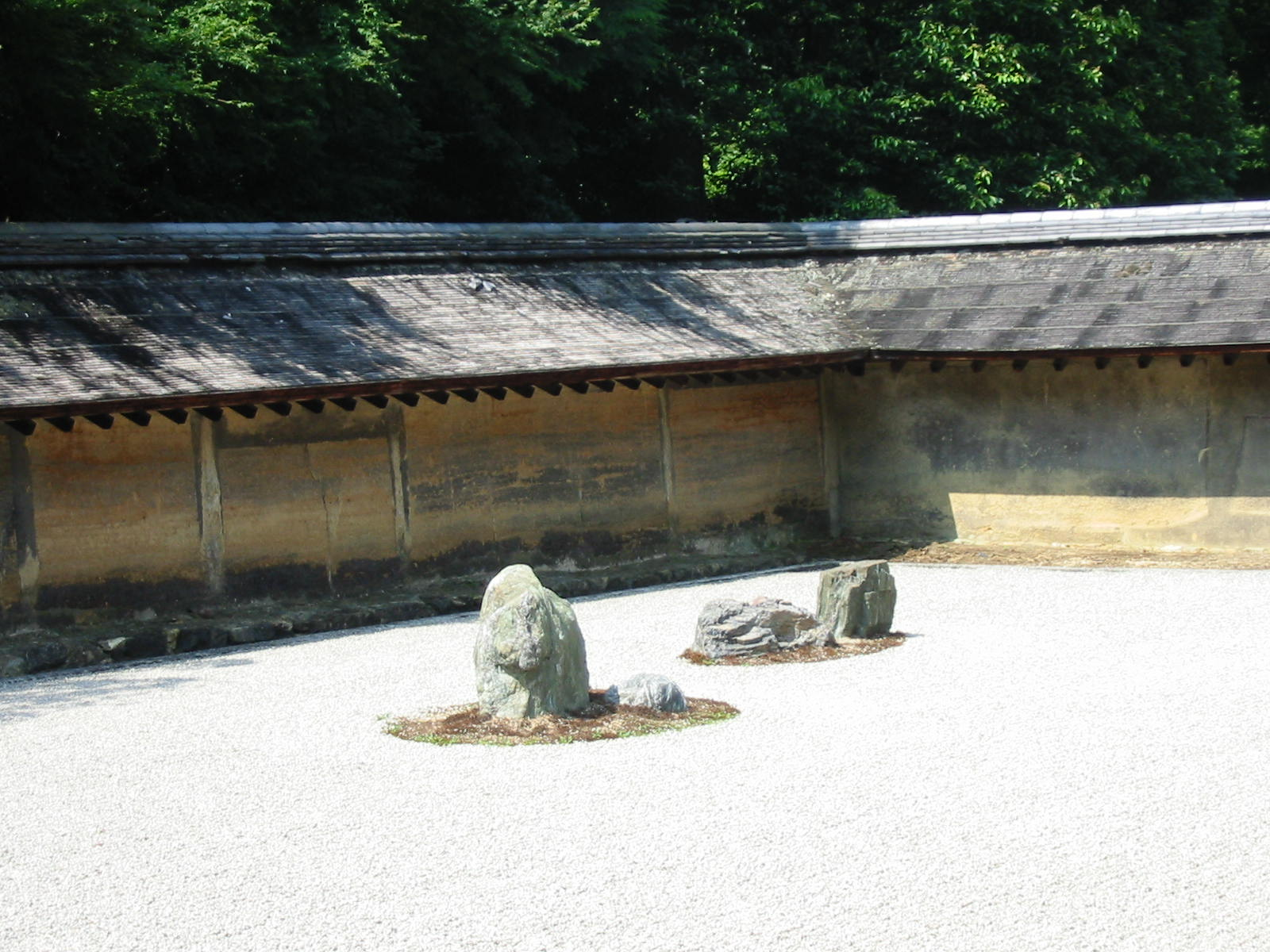 Ryoan-ji Zen tuin, eigen foto ter beschikking gesteld onder GFDL